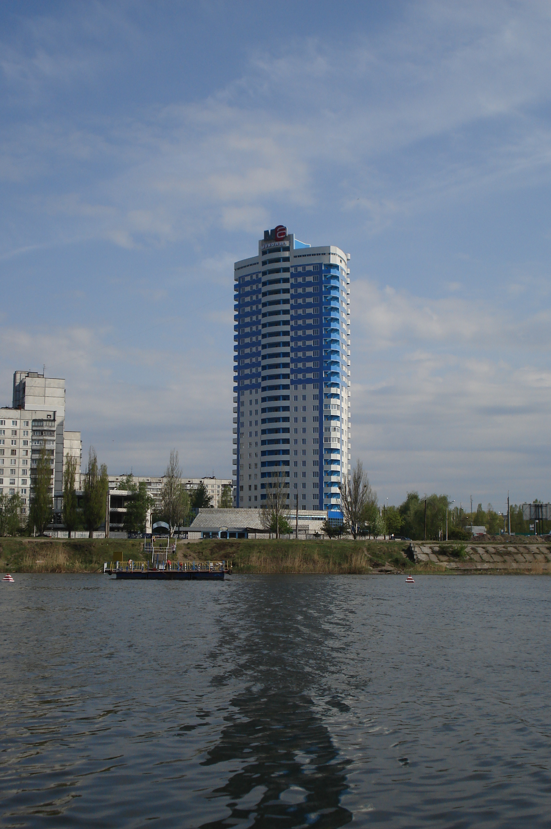 Недостроенный новый дом "Парус" на Салтовке, Харьков. Жилая 25-этажка на ул. Блюхера на левом (по течению) берегу гребного канала Журавлёвского гидропарка, год сдачи 2009, м/р Пески, 522(?) микрорайон.